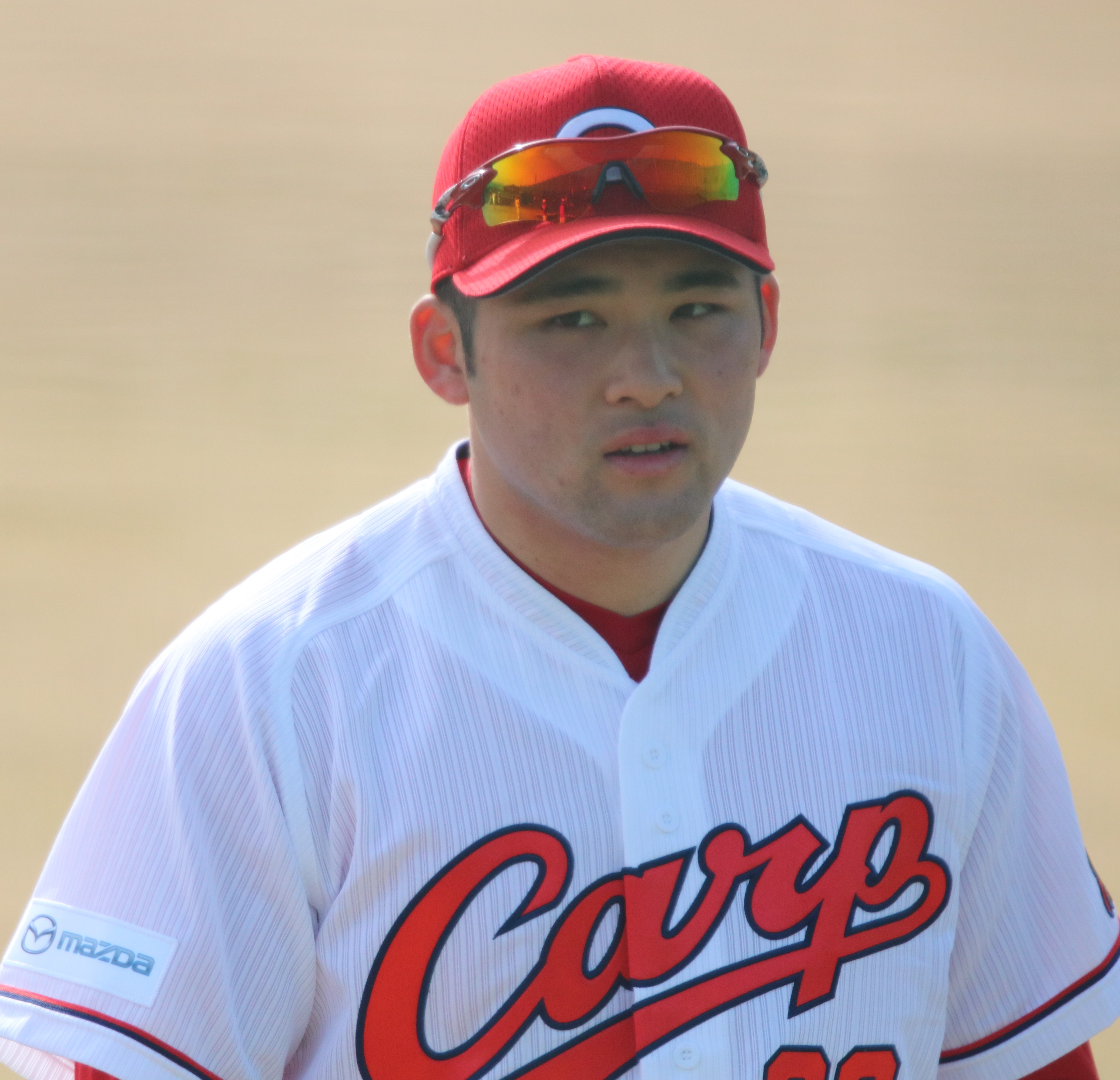 2018/2/8 東光寺球場